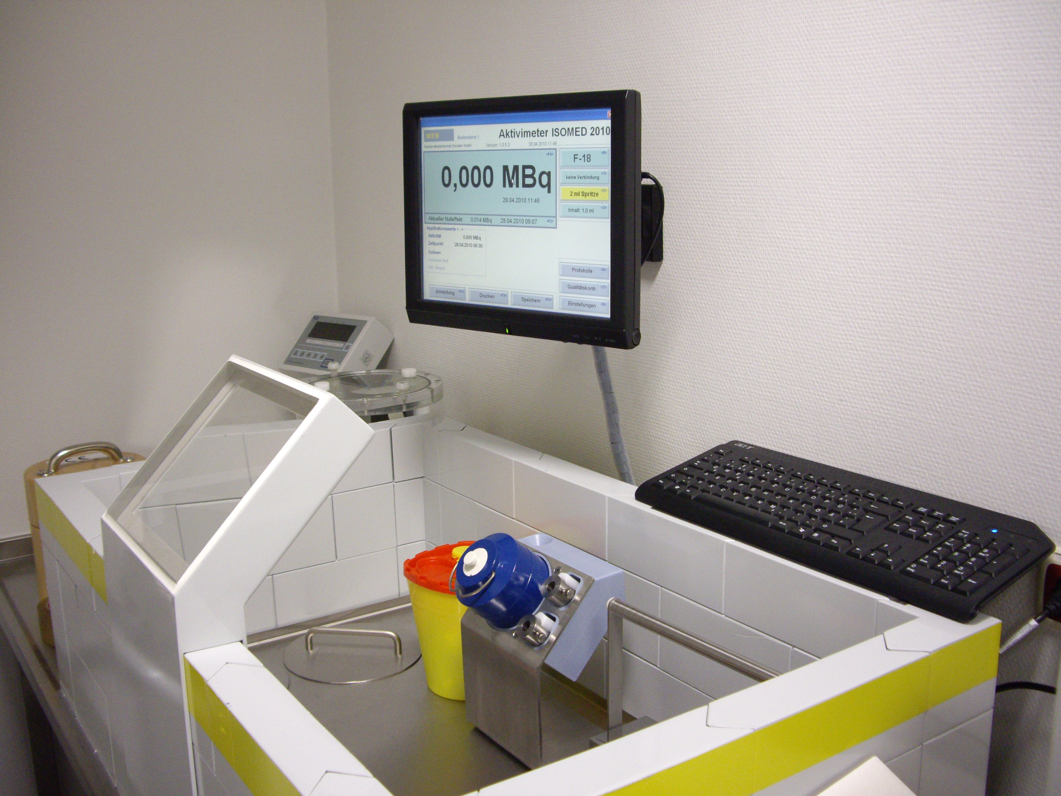 Eine Bleiburg in einem nuklearmedizinischen Heißlabor. Das zylindrische blaue Teil mit dem weißen Deckel innerhalb der Bleiburg ist ein ebenfalls mit mehreren cm Blei abgeschirmtes Transportgefäß für Radionuklidfläschchen (mit ca. 10 bis 15 ml Inhalt). Mit Hilfe des Drahtbügels kann das blaue Oberteil der Bleibombe abgenommen werden, um das Fläschchen einzusetzen oder zu entnehmen. Für optimalen Strahlenschutz wird zur Entnahme der Radionukliddosis anschließend nur die weiße, ebenfalls bleierne Kappe abgenommen. Die beiden kleinen Zylinder mit Bohrung und Rändelschraube rechts daneben sind Spritzenabschirmungen aus Wolfram, in die übliche 2 ml-Spritzen eingesetzt werden können. Die große Wandstärke der Spritzenabschirmungen von 8 mm Dicke ist nötig, um die hohe Photonenenergie von 511 keV abzuschirmen, die von PET-Tracern ausgesandt wird. In dem weißen Buckel auf den Spritzenabschirmungen ist ein Sichtfenster aus Bleiglas angebracht, durch das die Skala der Spritze abgelesen werden kann. Links neben der blauen Bleibombe befindet sich in gelber Farbe ein Abwurfbehältnis für gebrauchte Spritzen.